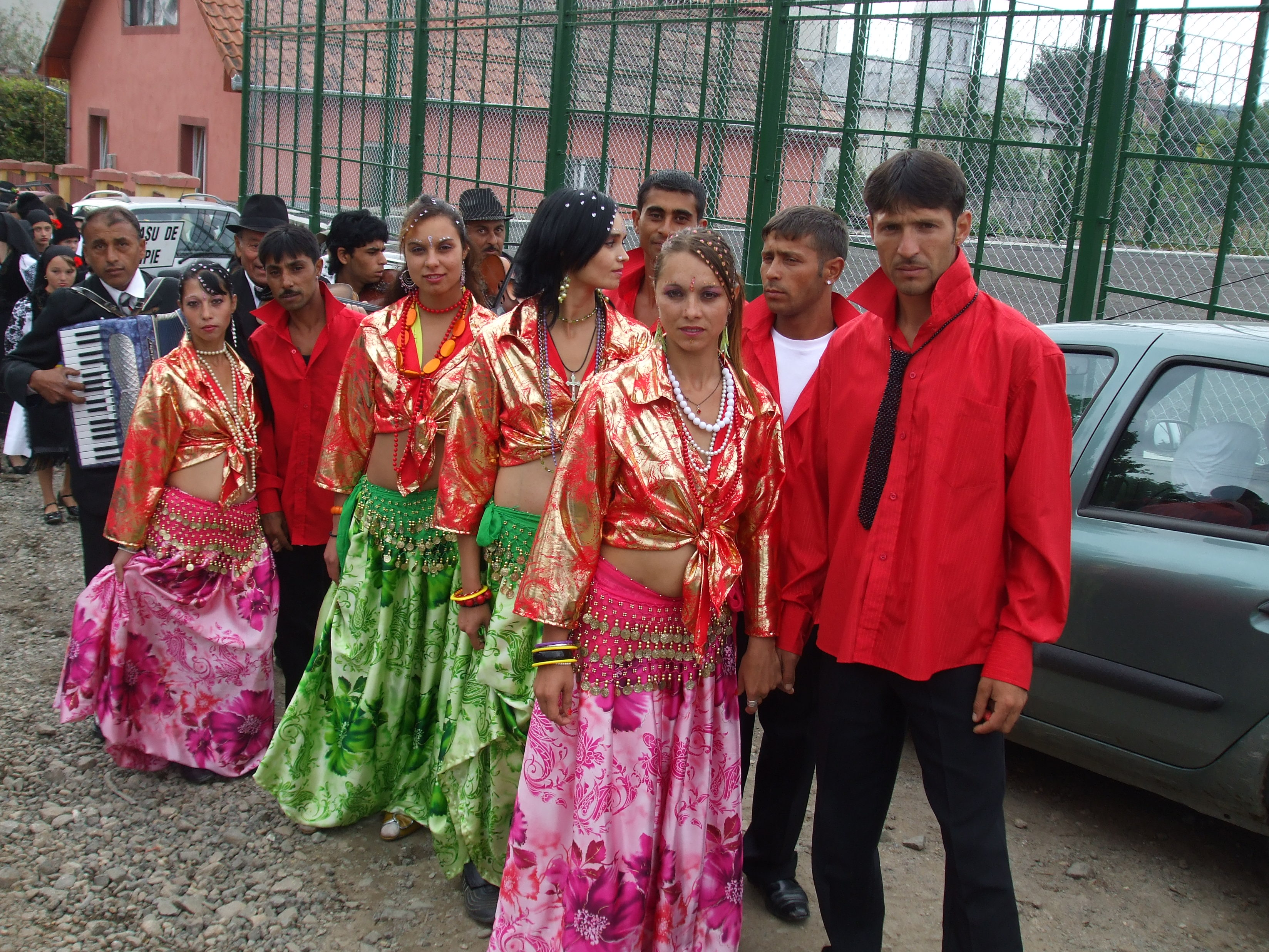 Dansatori romi din Mociu, Cluj.